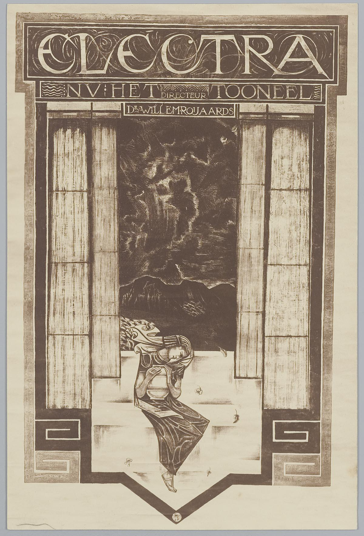 Affiche. "Electra". NV Het Tooneel.